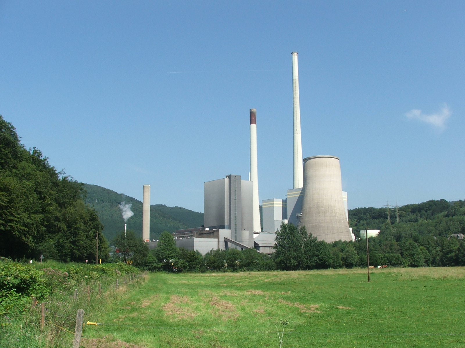 Kraftwerk Werdohl-Elverlingsen, Germany